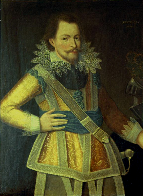 Graf Johann Friedrich von Schaesberg (* 21. Dezember 1598; † 1671), war seit 1637 Herr auf Schaesberg und Landhofmeister des Herzogtums Jülich. Seine am 19. Februar 1623 zu Brüggen bei Swalmen mit Fernanda von Wachtendonck († 29. August 1644) geschlossene Ehe brachte das Schloss Krickenbeck an die von Schaesberg. J. F. v. S. heirate zum 2. Mal 10. September 1647 Maria Heimbach genannt Hoen zu Loevenich († 9. Mai 1662); und zum 3. Mal 10. Juli 1663 Isabella Margaretha von Bernsau († 30. Dezember 1678).